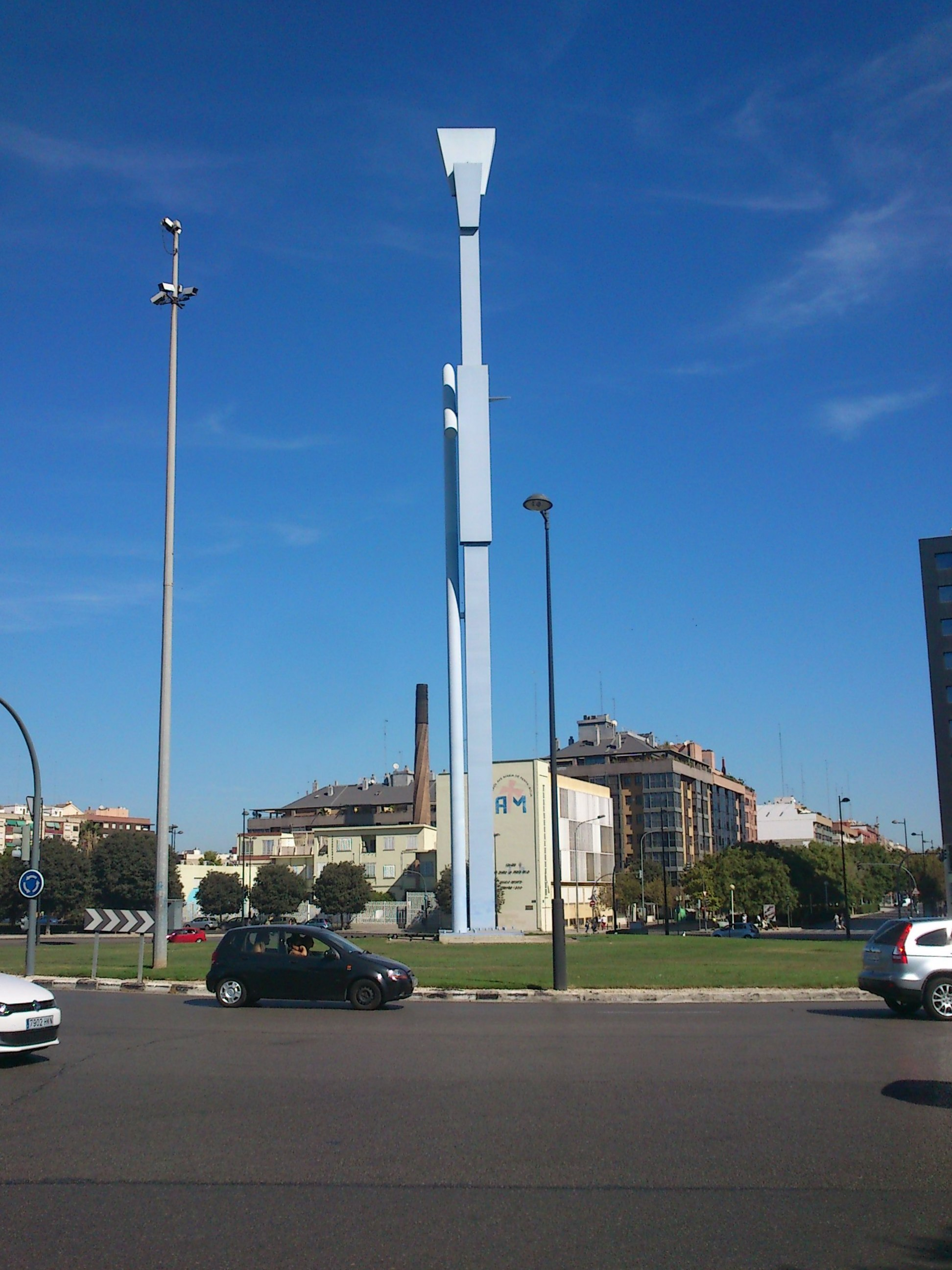 Parotet, escultura de Miquel Navarro.